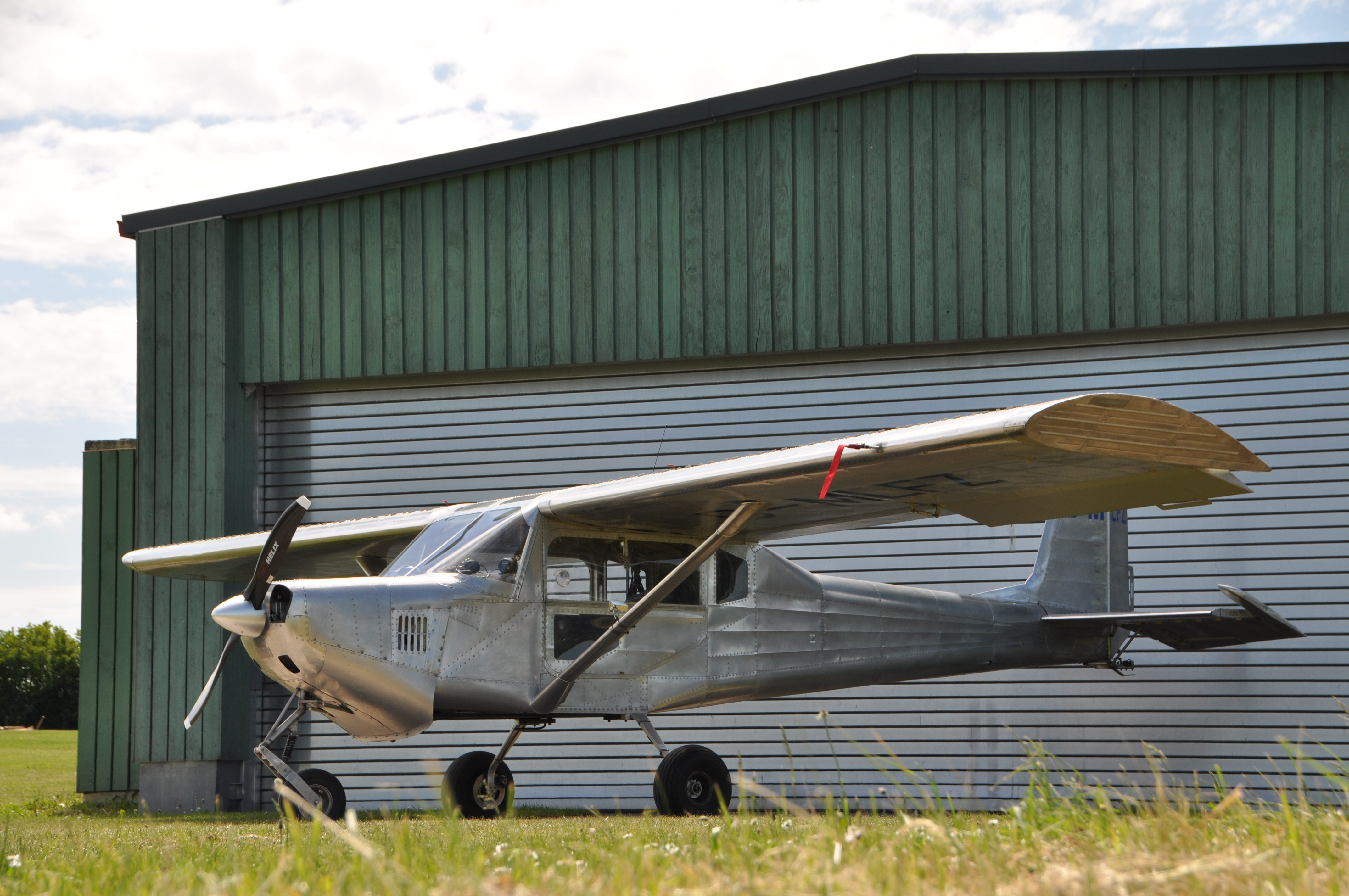 Ultraleichtflugzeug Wild Thing WT-02 Jabiru 3300 D-MLFZ